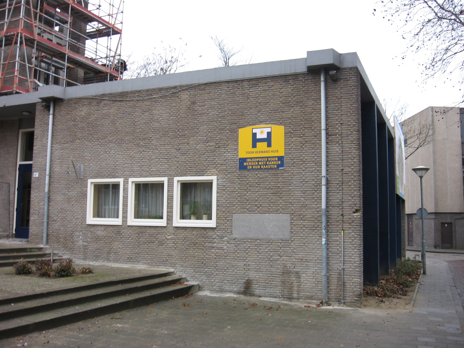 Venlo